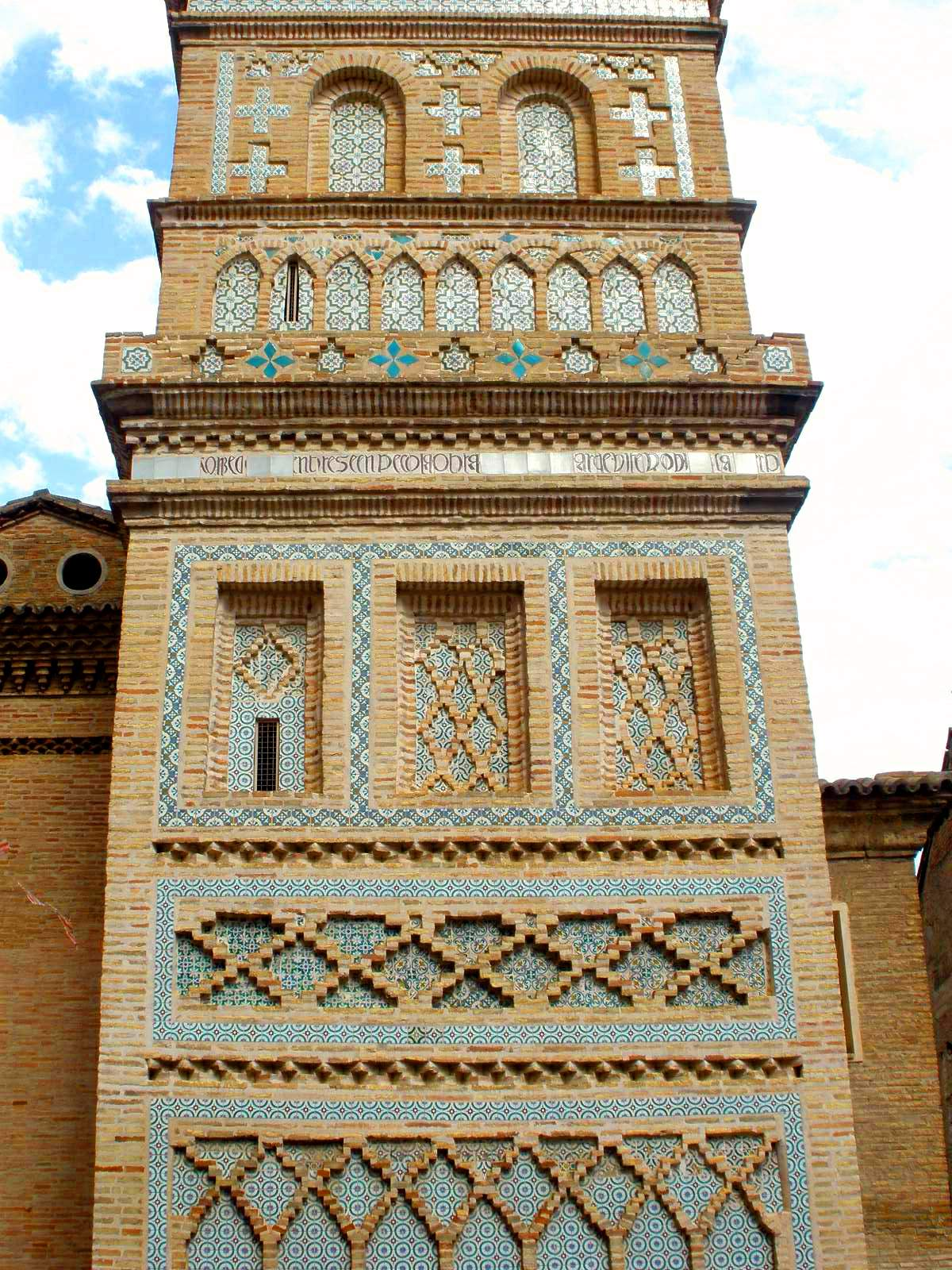 Iglesia de Nuestra Señora de la Asunción (Santa María), Utebo (Zaragoza)